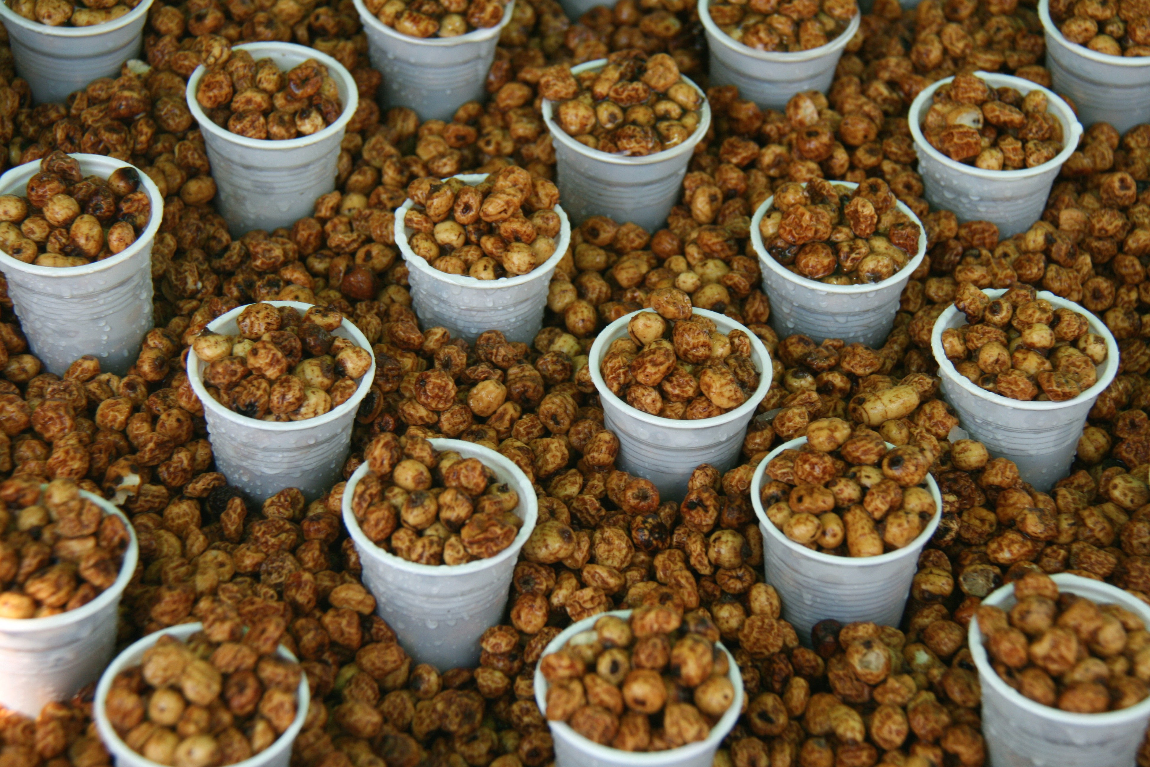 Chufas en la pradera